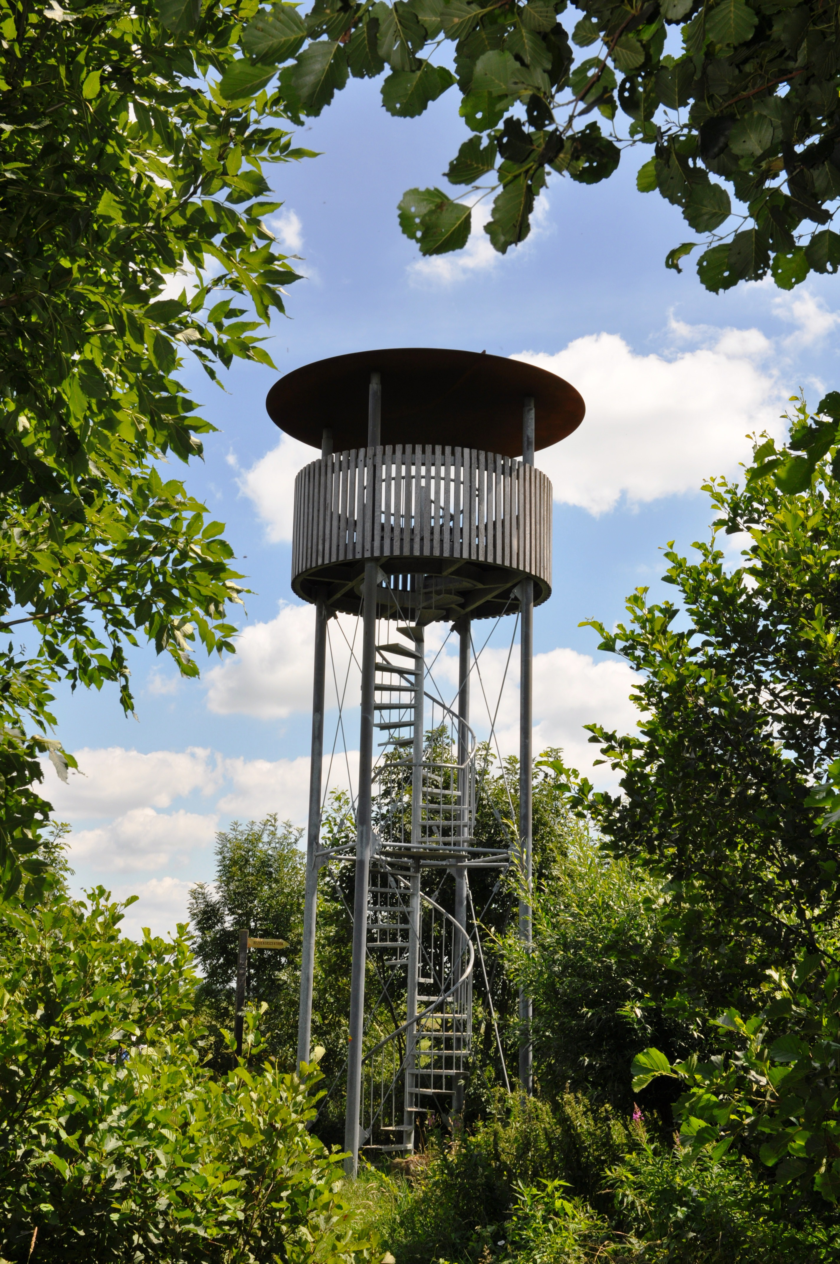 Natuurgebied Willeskop in Utrecht.